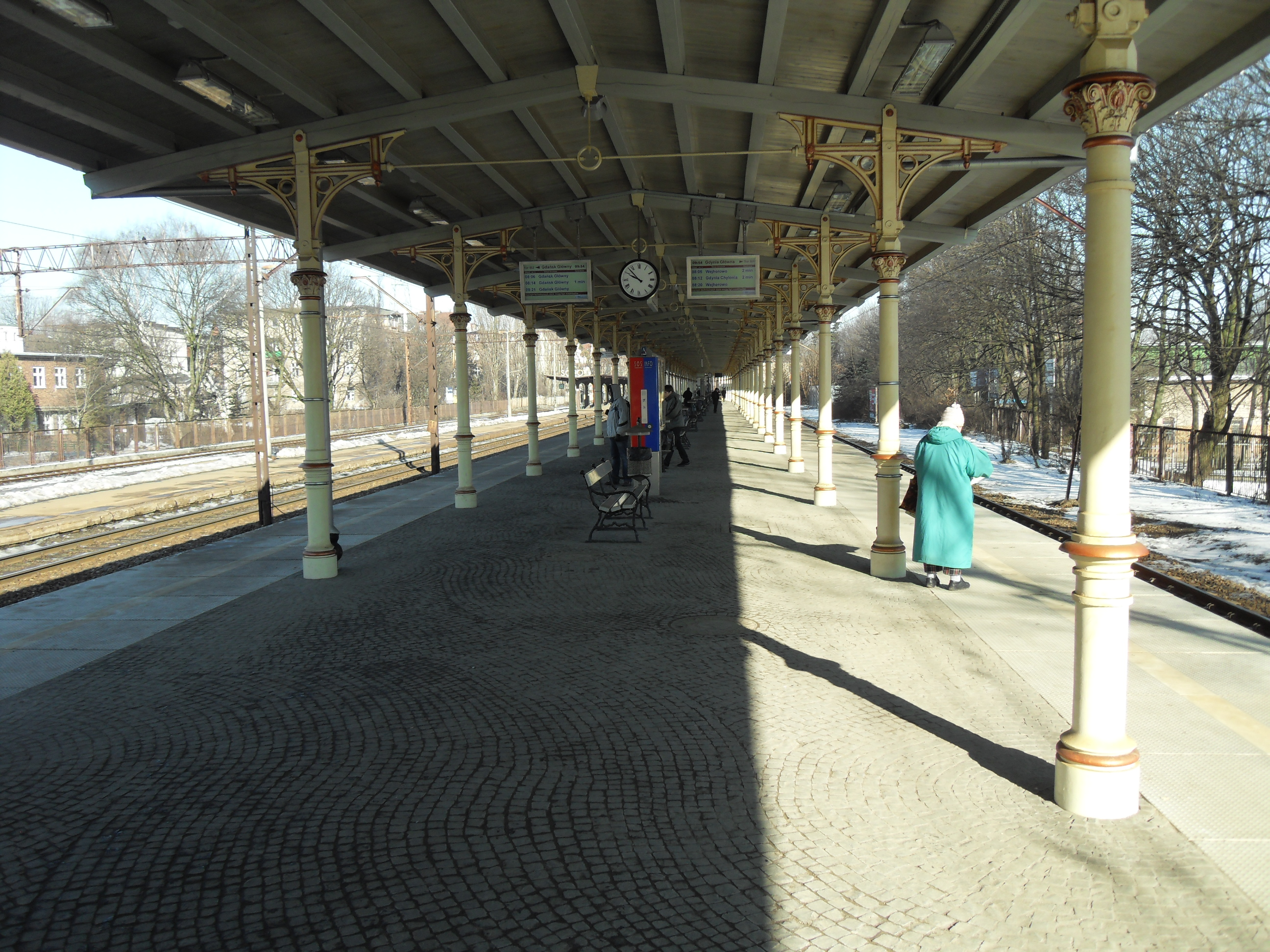 Peron SKM (podmiejski) w Sopocie, po renowacji (widok w kierunku Gdyni).